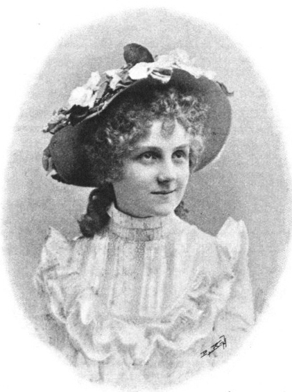 Gisela Wilke, österreichische Schauspielerin